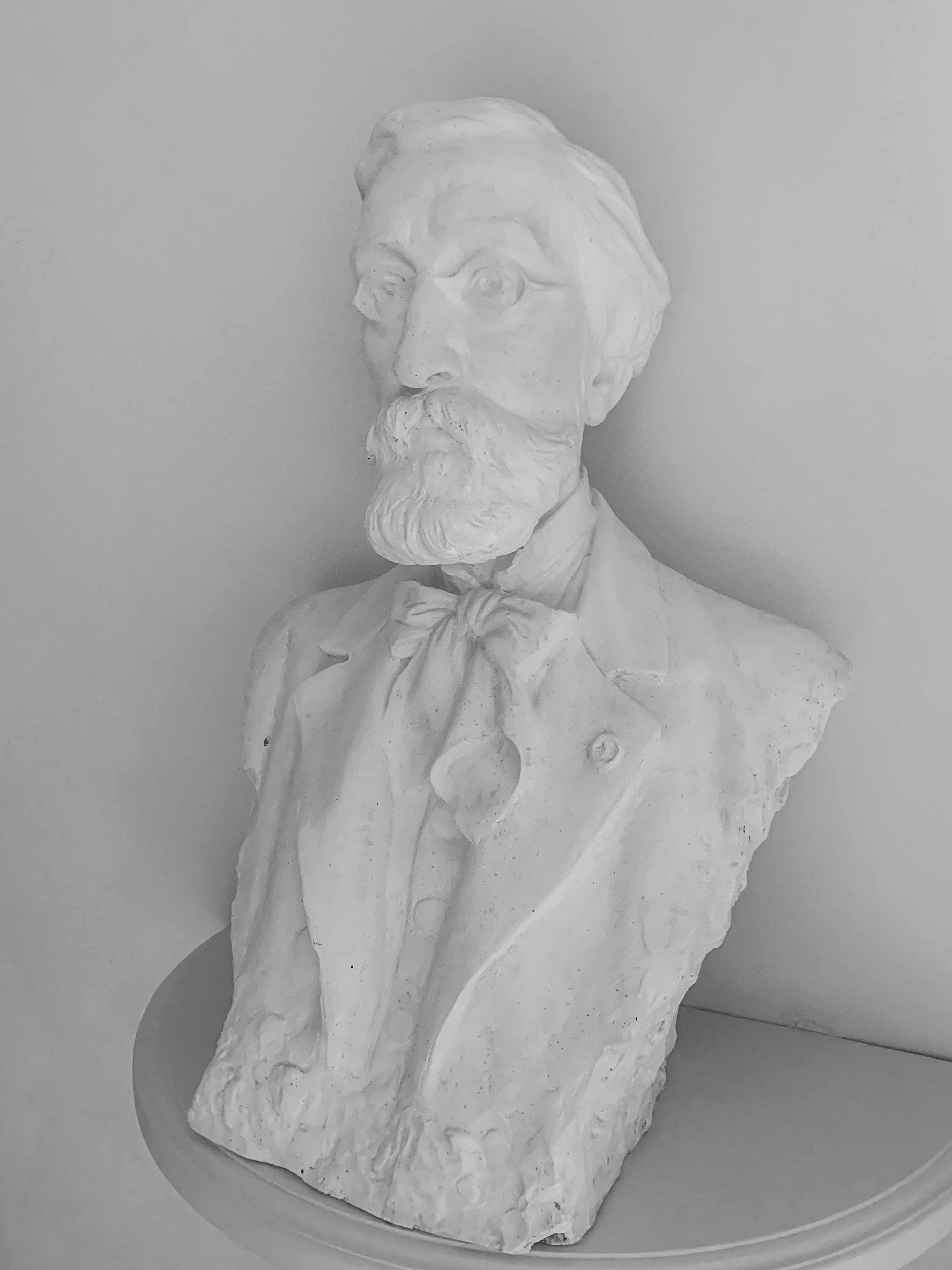 Copie du monument élevé à sa mémoire en 1904 à Nîmes, aujourd'hui disparu.